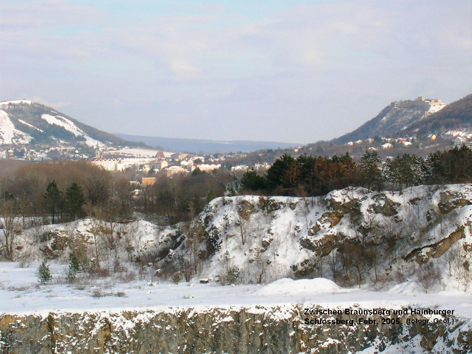 Braunsberg und Hainburger Schlossberg (frühere Donauenge) location:48.1515,16.9627